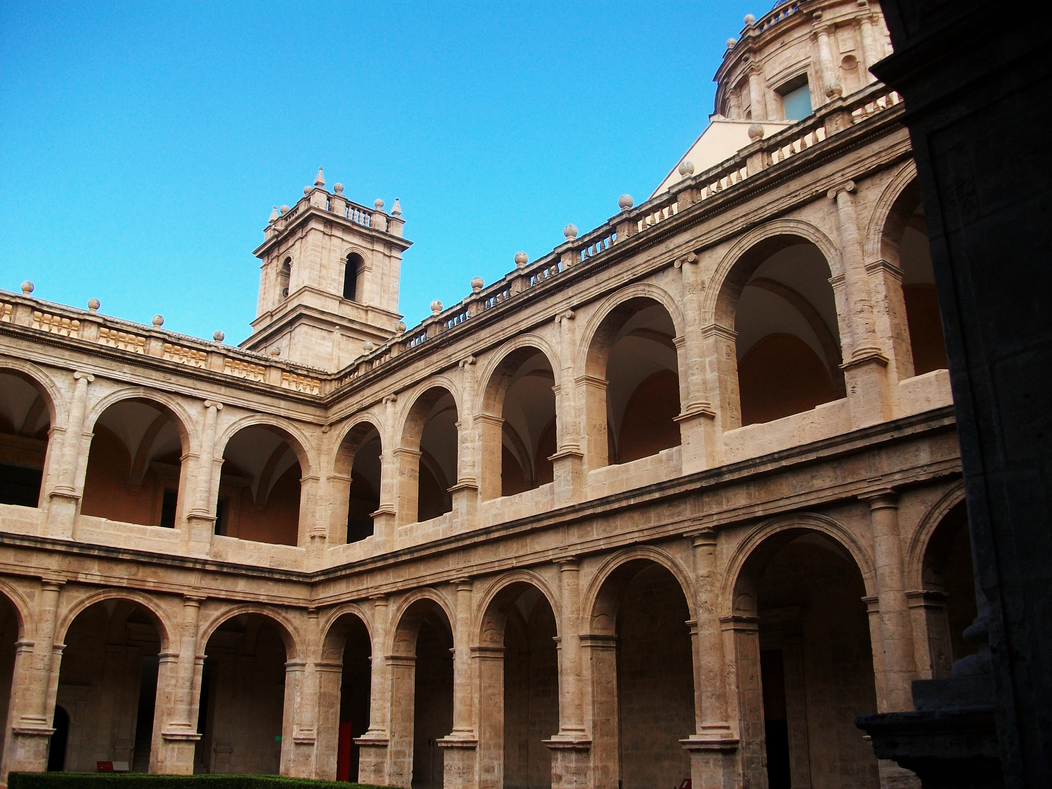 Claustre de sant Miquel dels Reis, València.